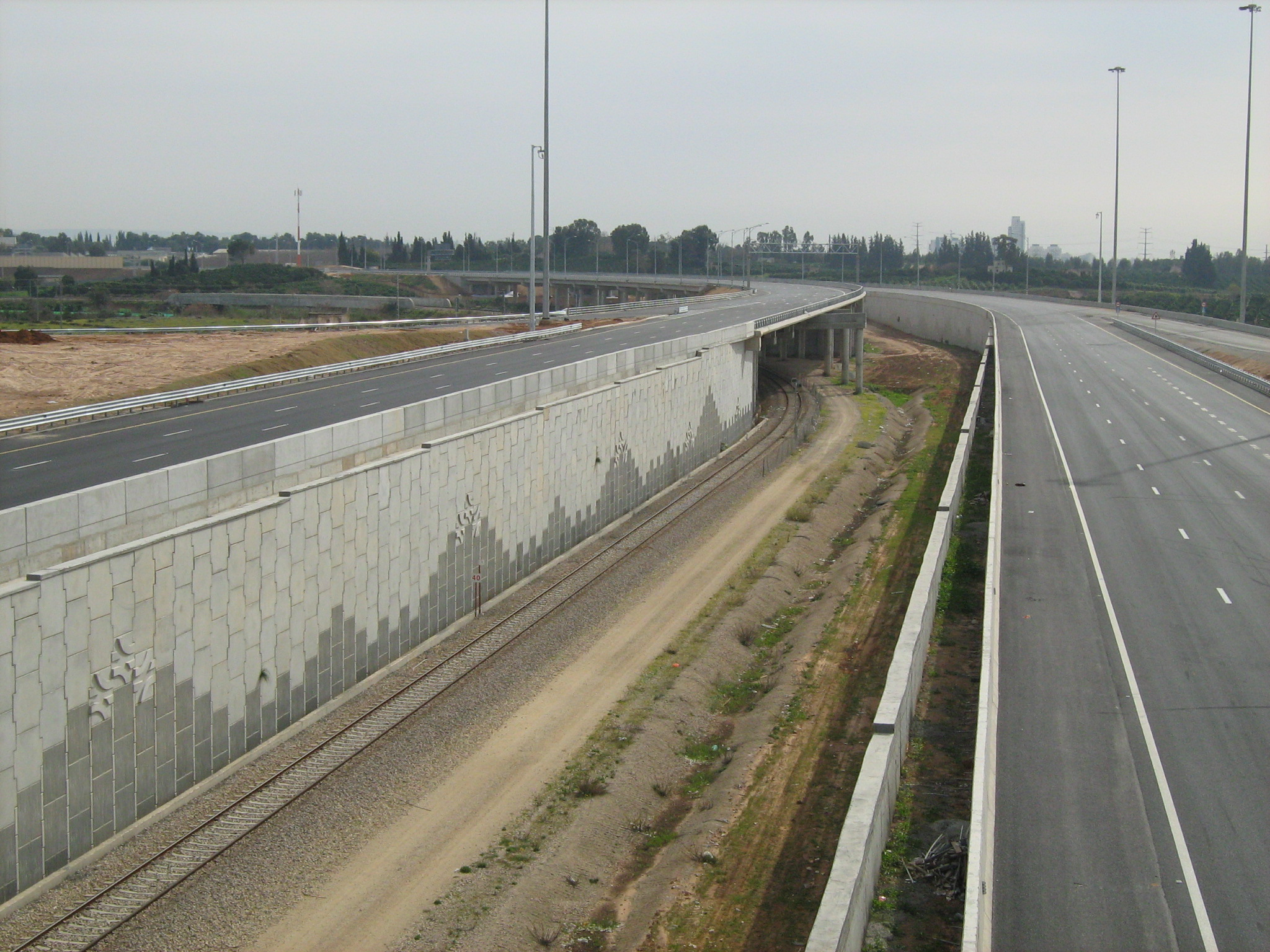 כביש 431 ומסילת הרכבת מתחנת הראשונים יוצאת מבין המסלולים ומתחברת למסילת הברזל בין רחובות לבאר יעקב